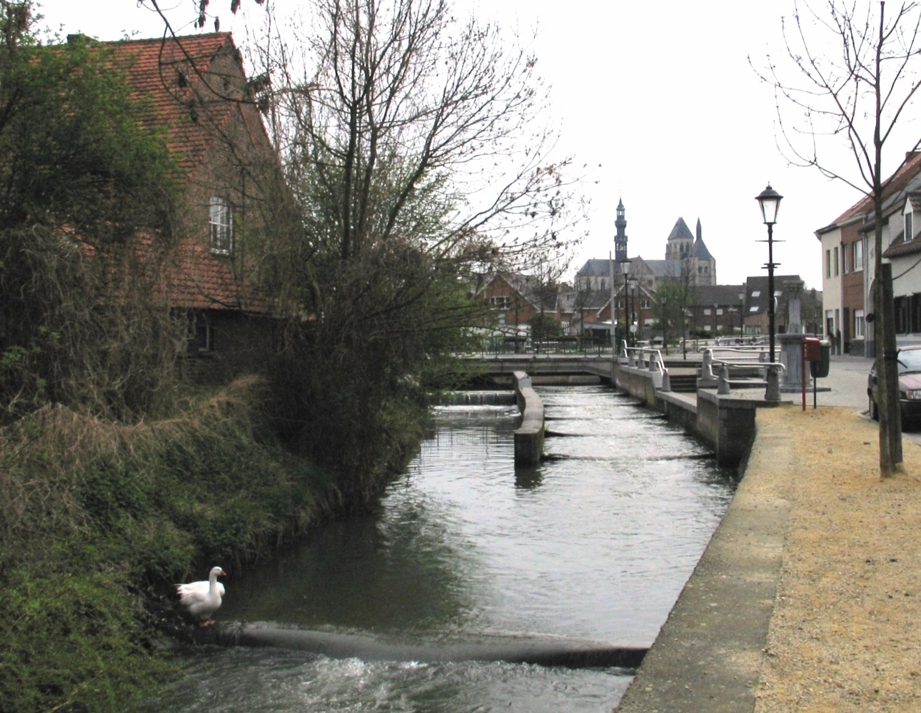 Kleine Gete te Zoutleeuw - eigen foto